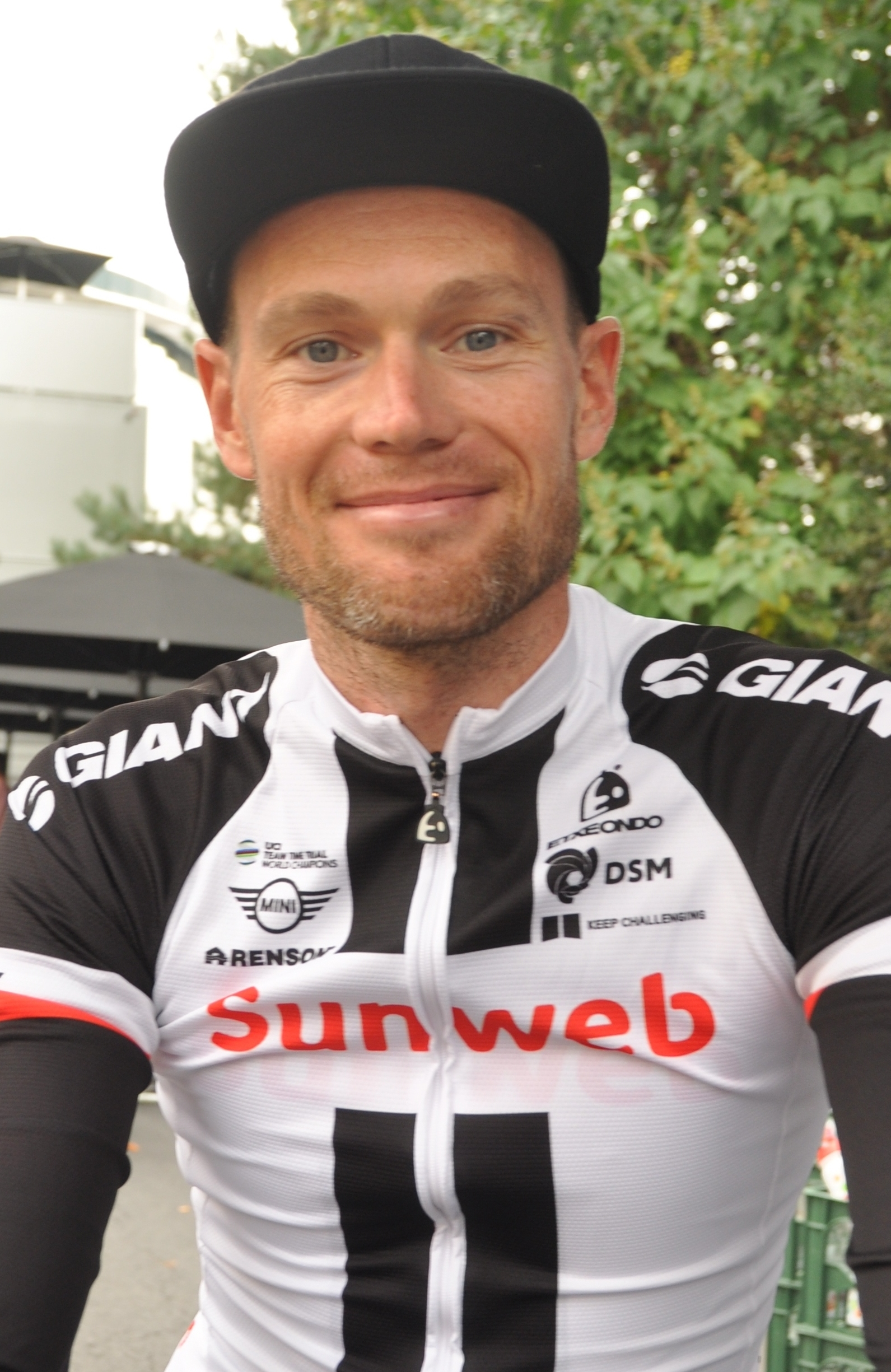 Tom Stamsnijder, niederländischer Radrennfahrer